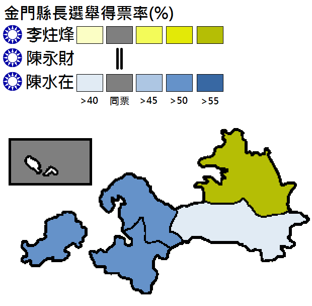 中文（台灣）: 1993年金門縣長選舉